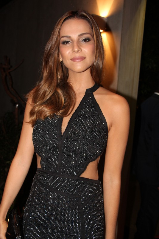 28 - Taina Muller-001